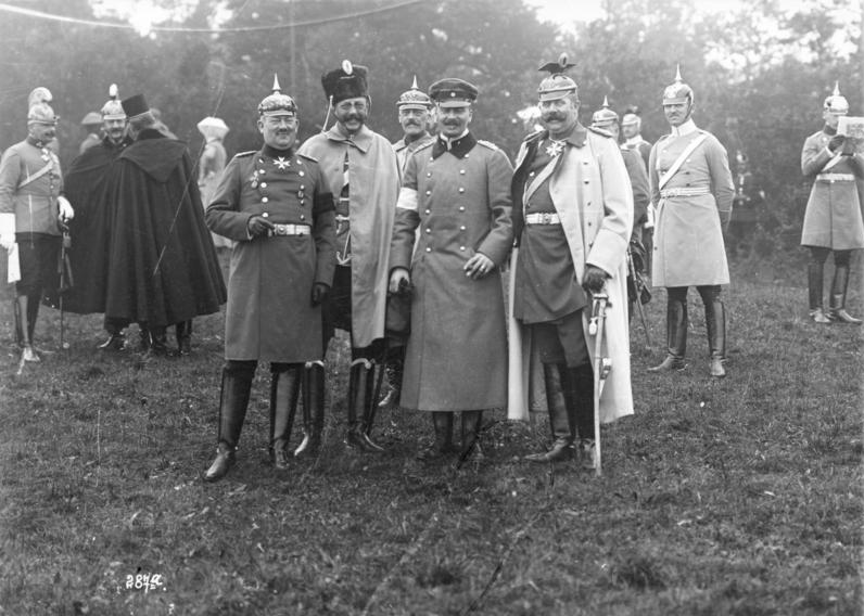 Süddeutschland, Kaisermanöver, Erzherzog Franz Ferdinand Kaisermanöver in Württemberg, Baden und Bayern 1909 von links: Erbprinz v. Hohenzollern, Erzherzog Franz Salvator v. Österreich, Herzog v. Mecklenburg, Erzherzog u. österr[eichischer] Thronfolger Franz Ferdinand